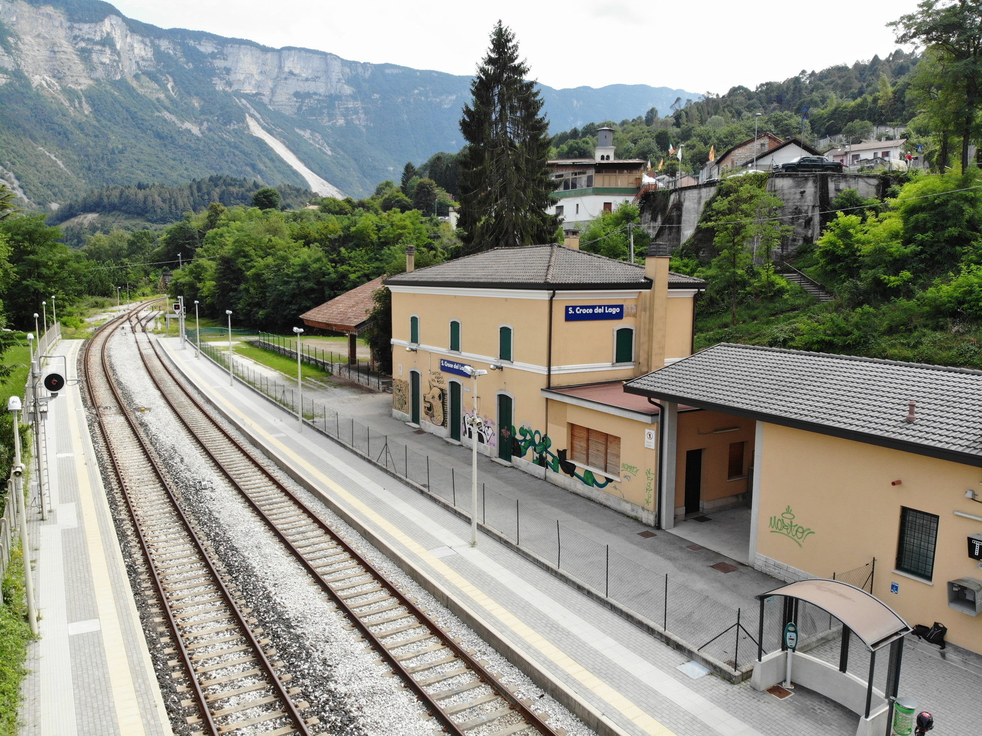 Stazione di Santa Croce del Lago (BL)